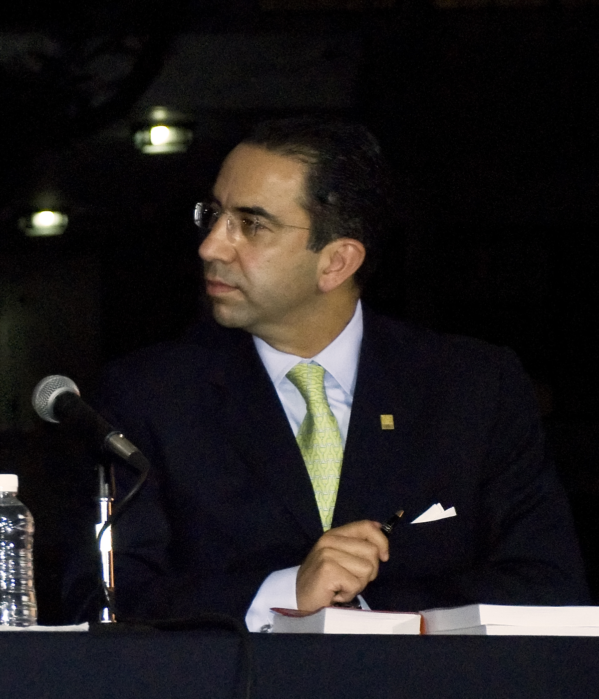 josé ángel córdova villalobos, agustin carstens y javier lozano (de izquierda a derecha), encargados de las secretarías de salud, hacienda y trabajo, dieron una conferencia de prensa hoy 29 de Abril. Anunciaron la suspensión de actividades de la administración pública federal del 1 al 5 de mayo. Al mismo tiempo, garantizaron el abasto de medicinas y alimentos y la continuidad de los servicios de salud, protección, transporte y telecomunicaciones. También dijeron que, en México, se han confirmado 99 casos de enfermos de Influenza Porcina. De estos, 8 han muerto y el resto sigue en recuperación. Comentaron que la OMS subió la alerta a la Fase 5. Secretaries of Health, Treasury and Labour gave a press conference today. They announced the suspension of all non-necessary government activities from may 1 to 5. At the same time, they guaranteed food and medicine supplies and the continuity of key activities such as health, transport, police and communications. They also stated that there are 99 people sick with Swine Flu in Mexico. 8 of them have died already and the others are recovering. They also informed that the WHO has raised the level of influenza pandemic alert from 4 to 5. Imagen totalmente de libre reproducción, modificación y lo que sea. Si das crédito, chido, muchas gracias :-D si no, igual de chido que la usas ;-) Ve más imágenes de libre distribución en: Image free for reproduction Watch more Creative Commons pictures in